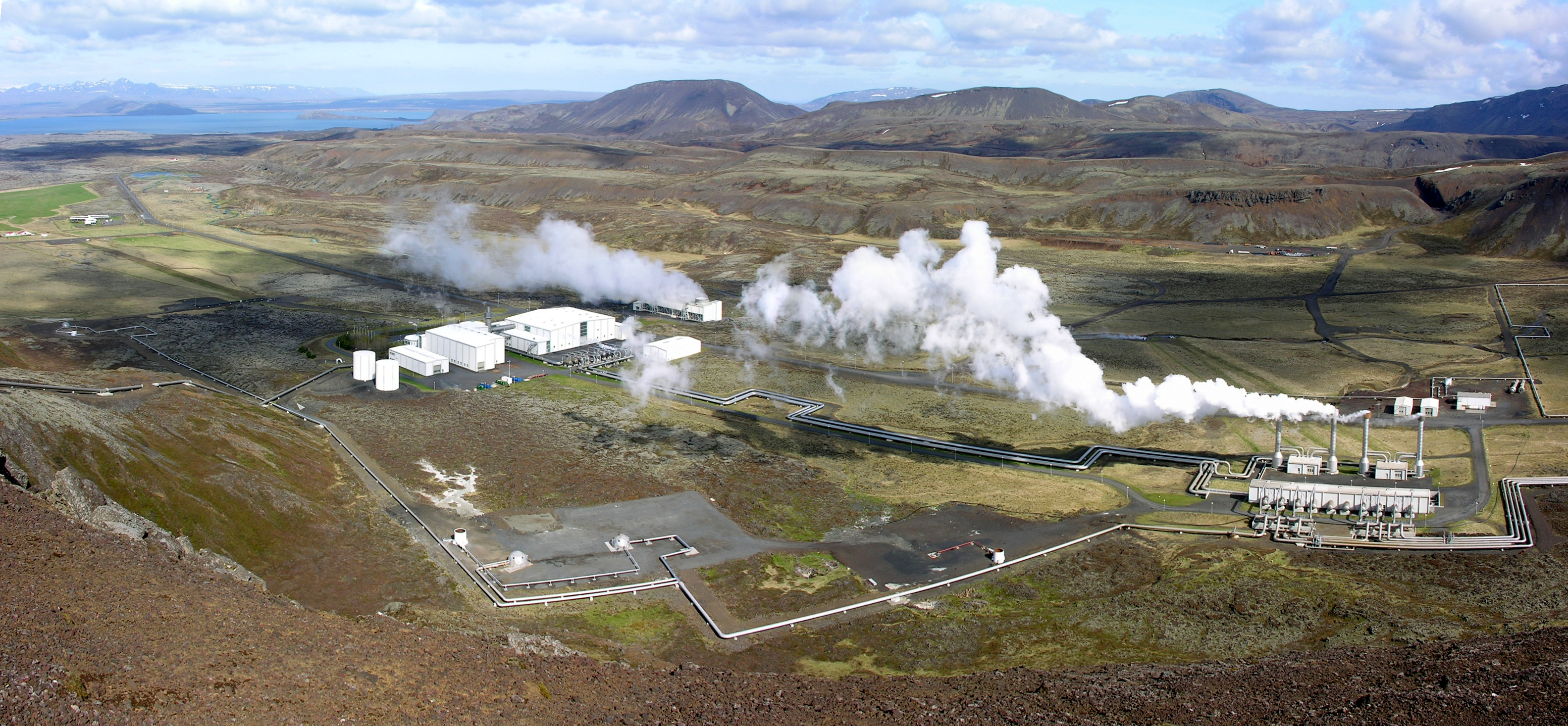 Nesjavallavirkjun